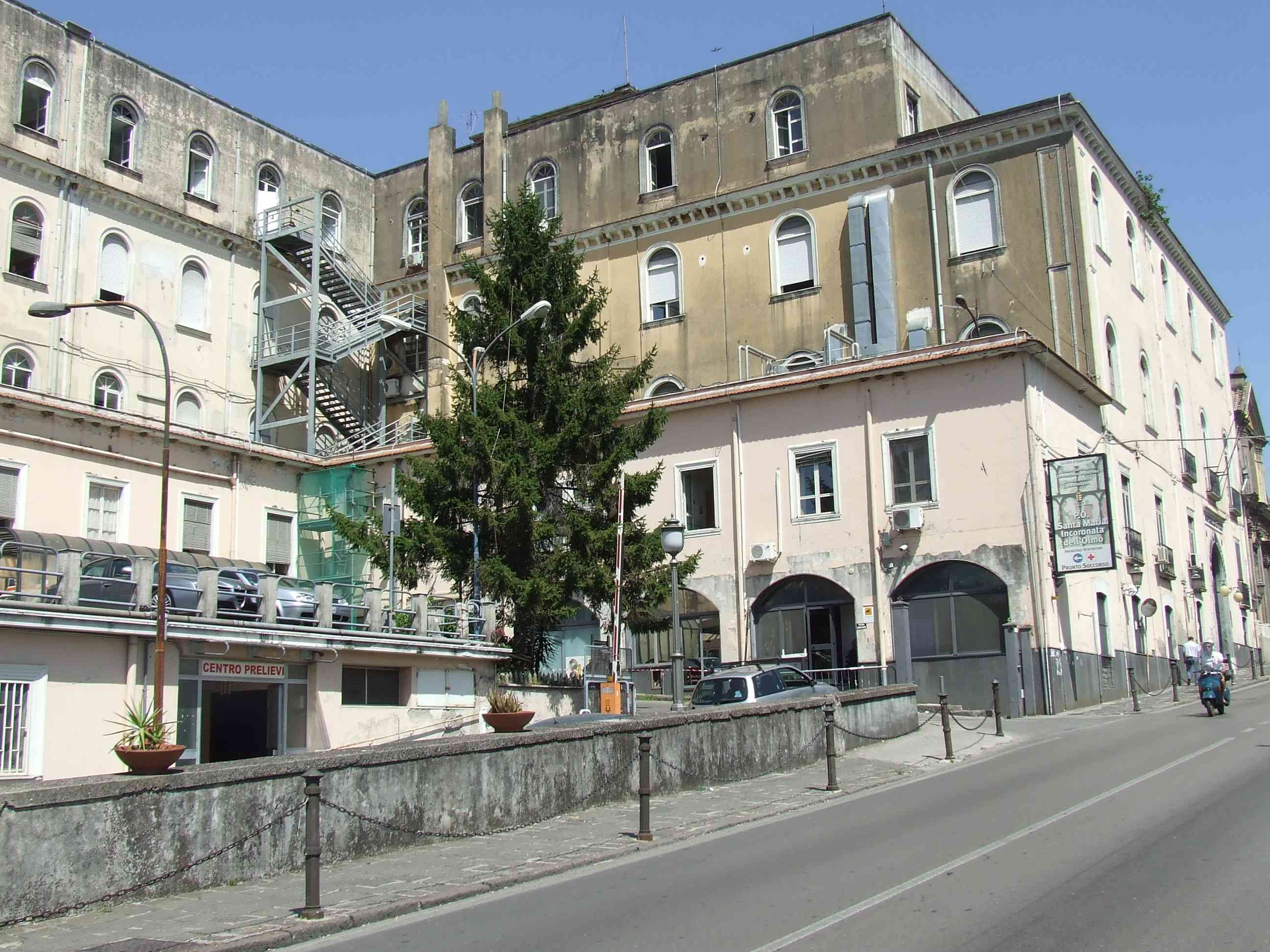 ospedale di Cava dei Tirreni